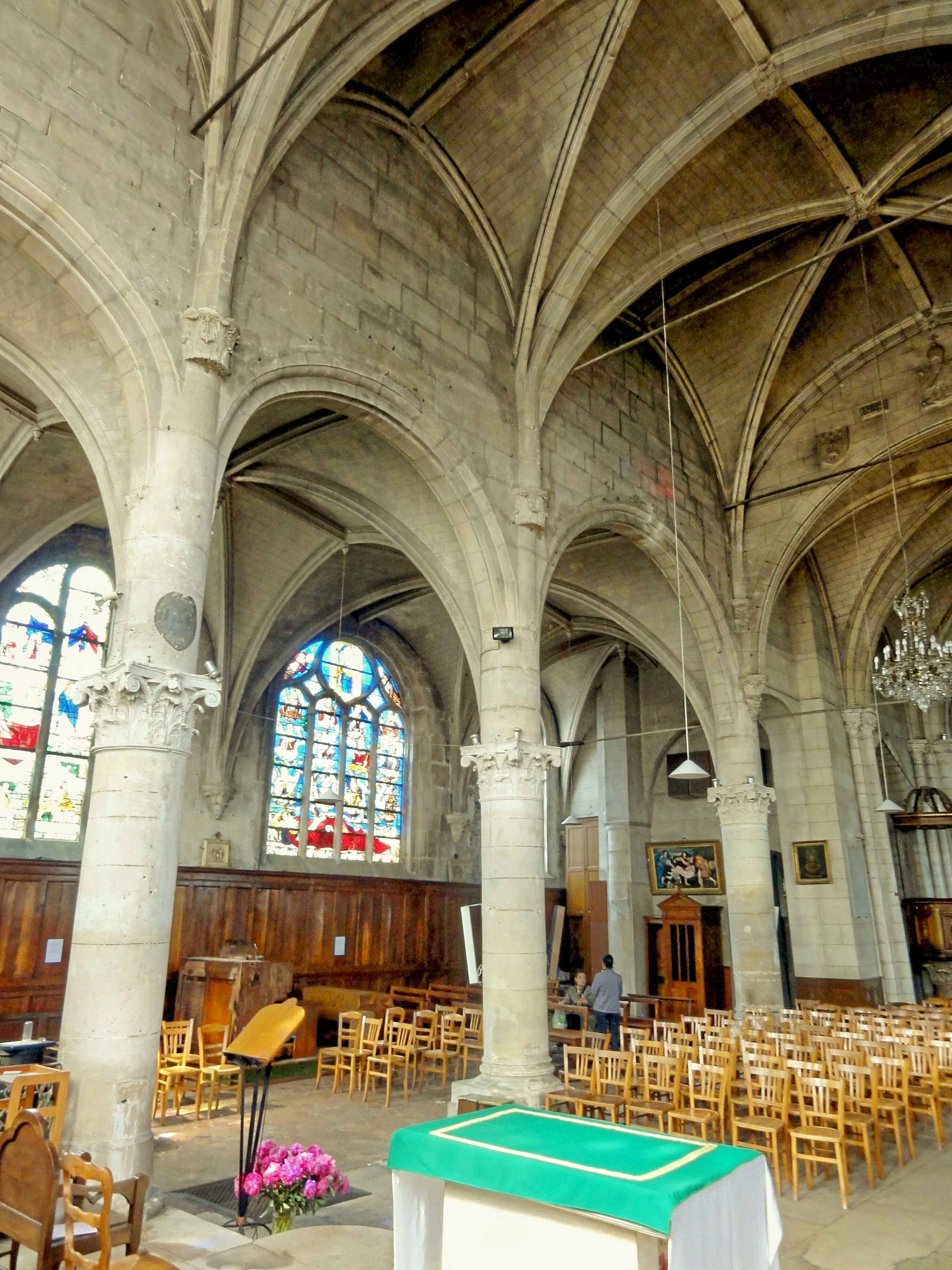 Nef, grandes arcades au sud.